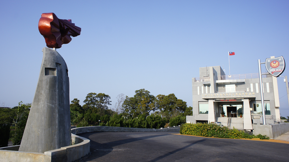 中文（台灣）: 臺中市政府警察局烏日分局瑞井派出所，位於臺中市大肚區遊園路一段1之1號。